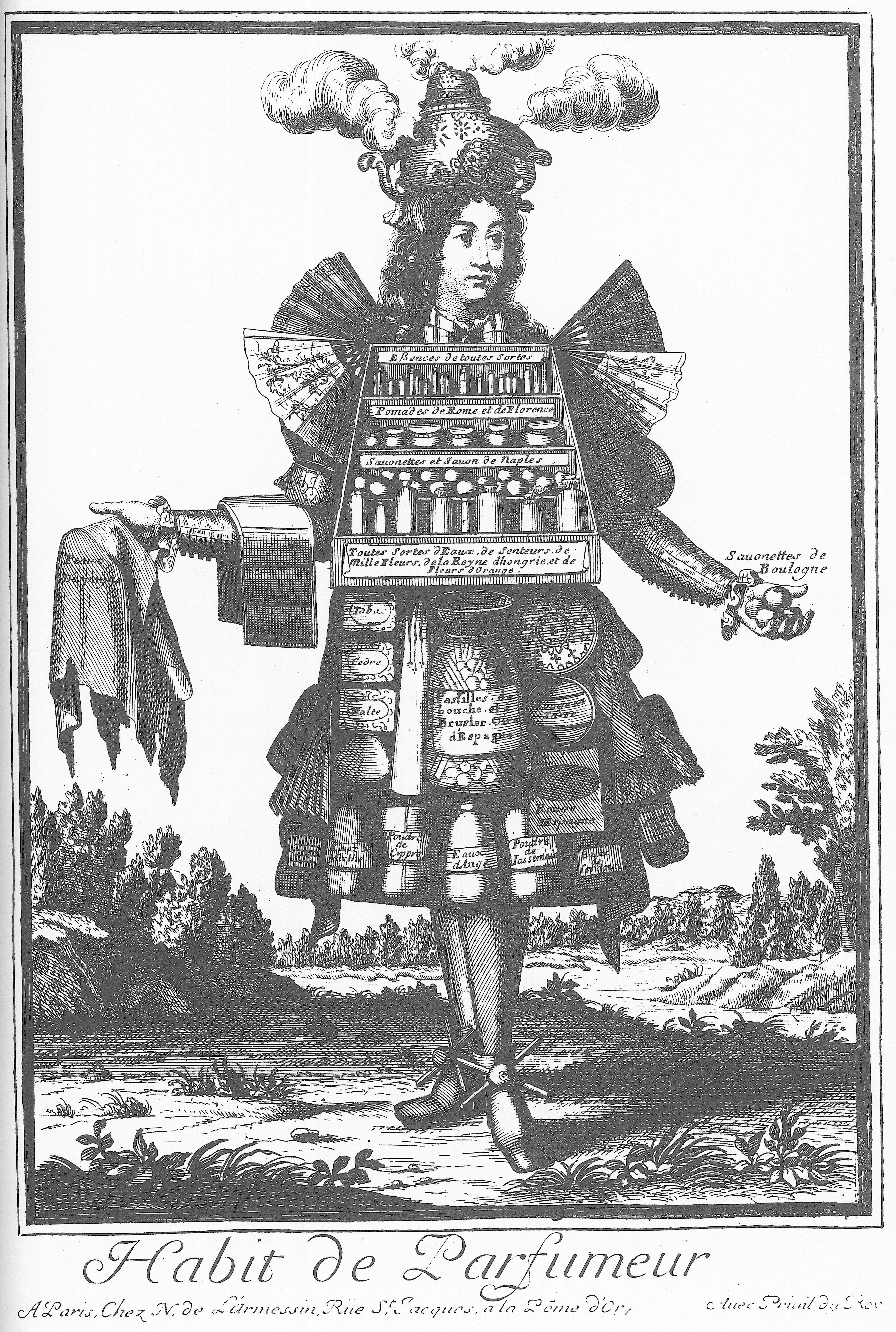 Gravure attribuée à Nicolas II de Larmessin, réalisée probablement au XVIIe siècle.